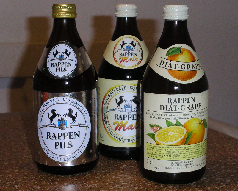 Getränke der Brauerei Rapp: Pils, alkoholfreies Malz, Diät-Grape Limonade